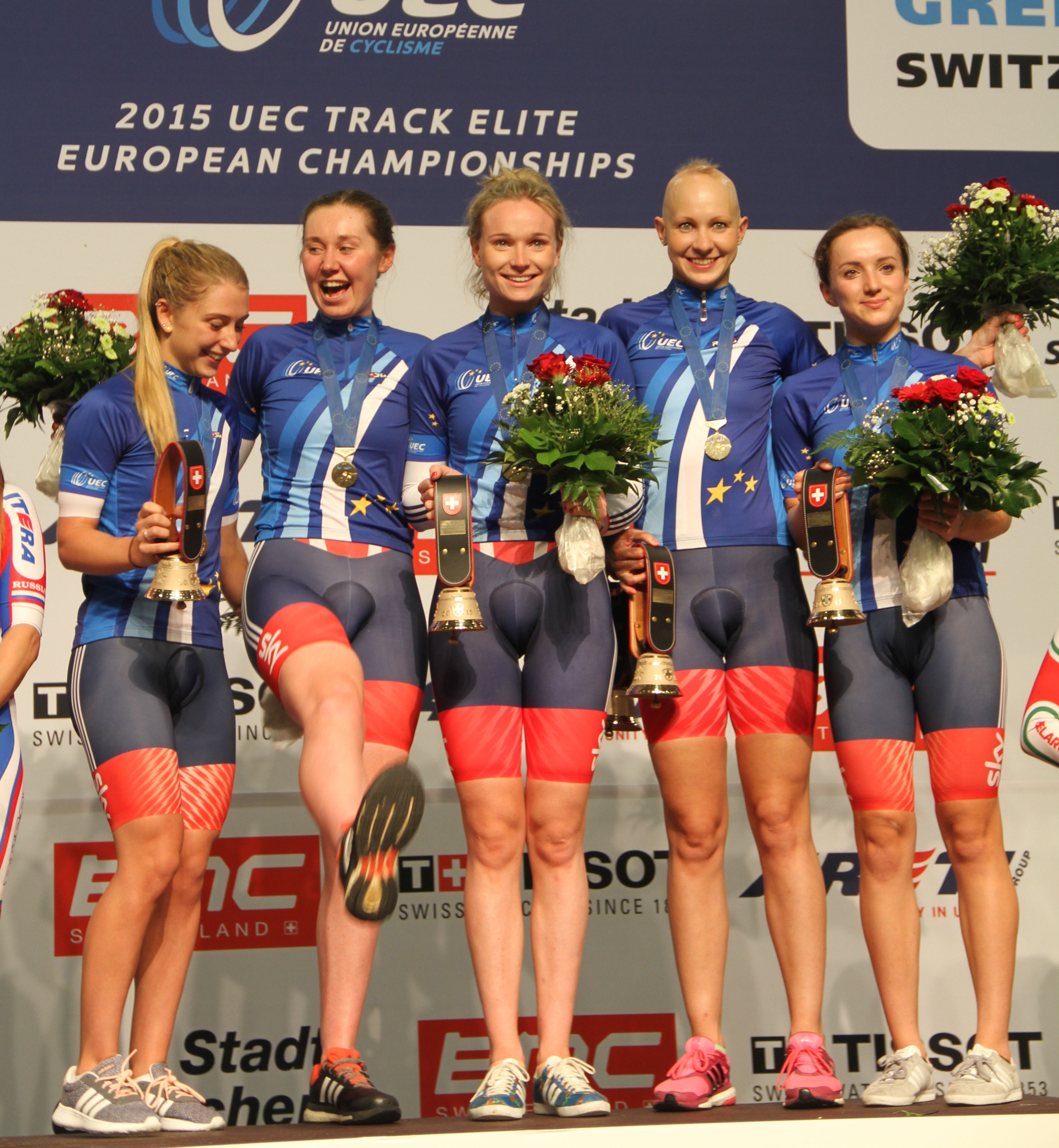 Britischer Frauen-Vierer, Europameister 2015 (v.l.n.r.): Laura Trott, Katie Archibald, Ciara Horne, Joanna Rowsell, Elinor Barker The making of this document was supported by the Community-Budget of Wikimedia Germany.